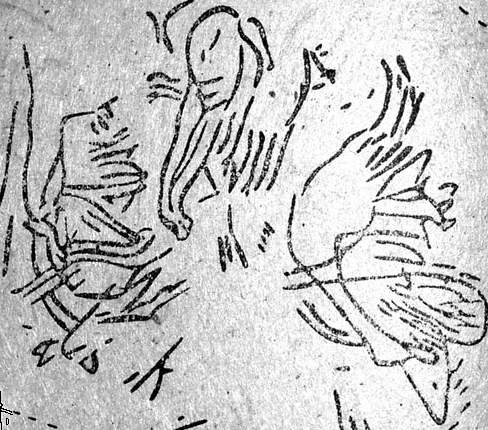 Петрогліфи Кам'яної Могили